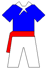 Divisa Mbuttaturi della Madonna del Soccorso